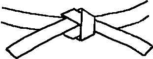 Ceinture blanche de Judo